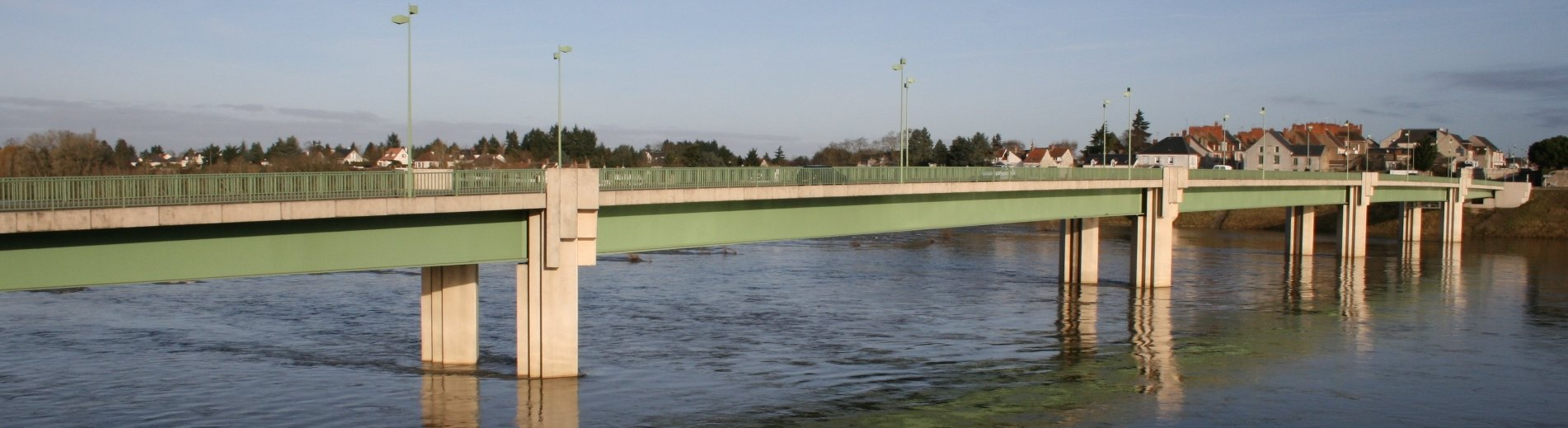 Pont de Jargeau (Loiret - France)